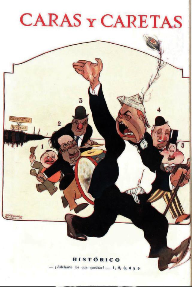 Caricatura que muestra el presidente Hipólito Yrigoyen seguido por los gobernadores partidarios suyos, entre ellos Miguel Campero tocando el tambor mayor. Revista Caras y Caretas, año 1928.